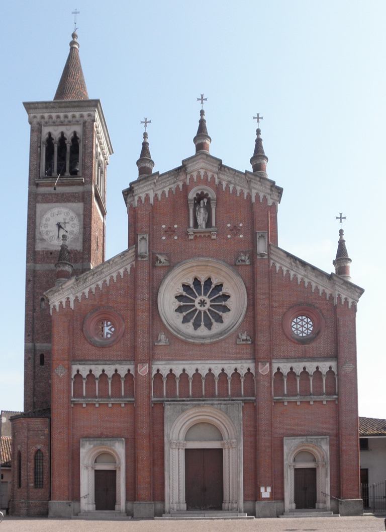 La chiesa parrocchiale di Secugnago.